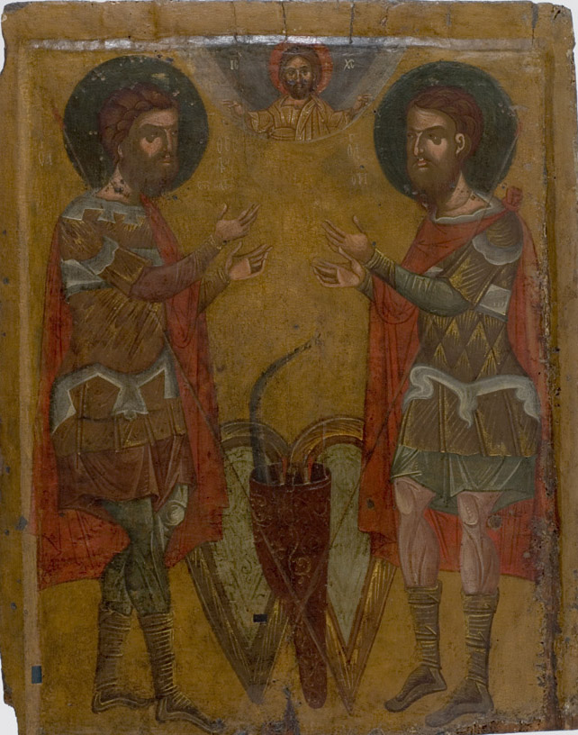 Οι Άγιοι Θεόδωροι Δ΄ τέταρτο 15ου αι. Άγιοι Θεόδωροι, Βέροια